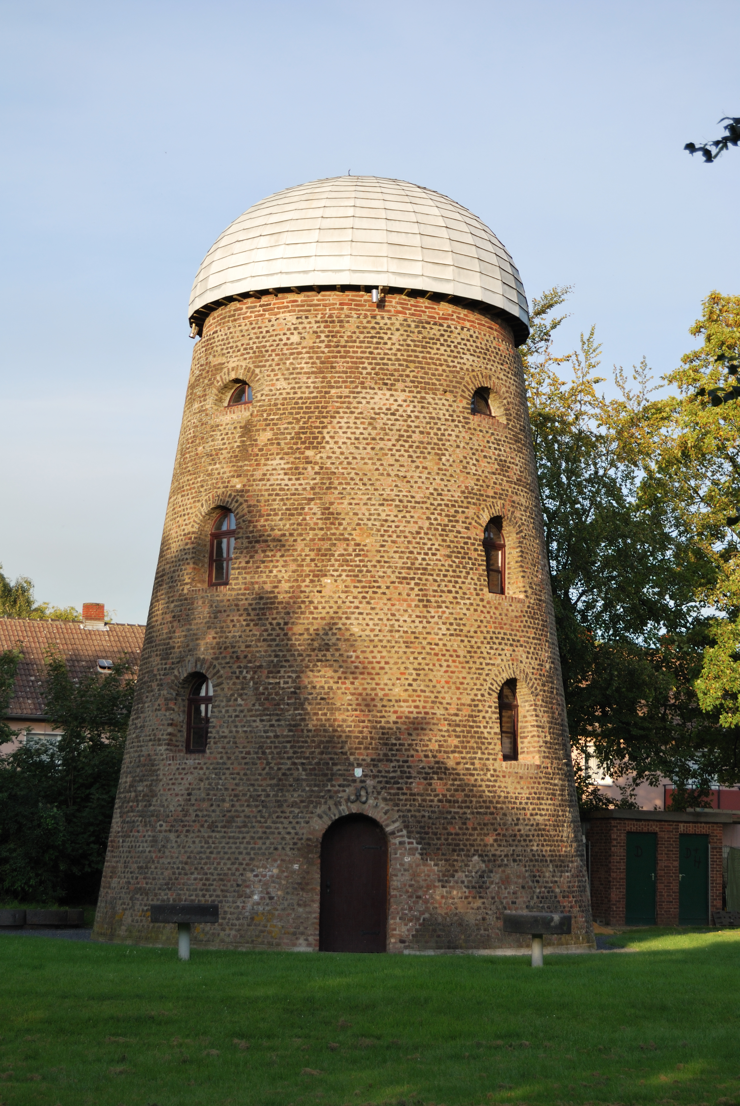 Denkmalnummer 17